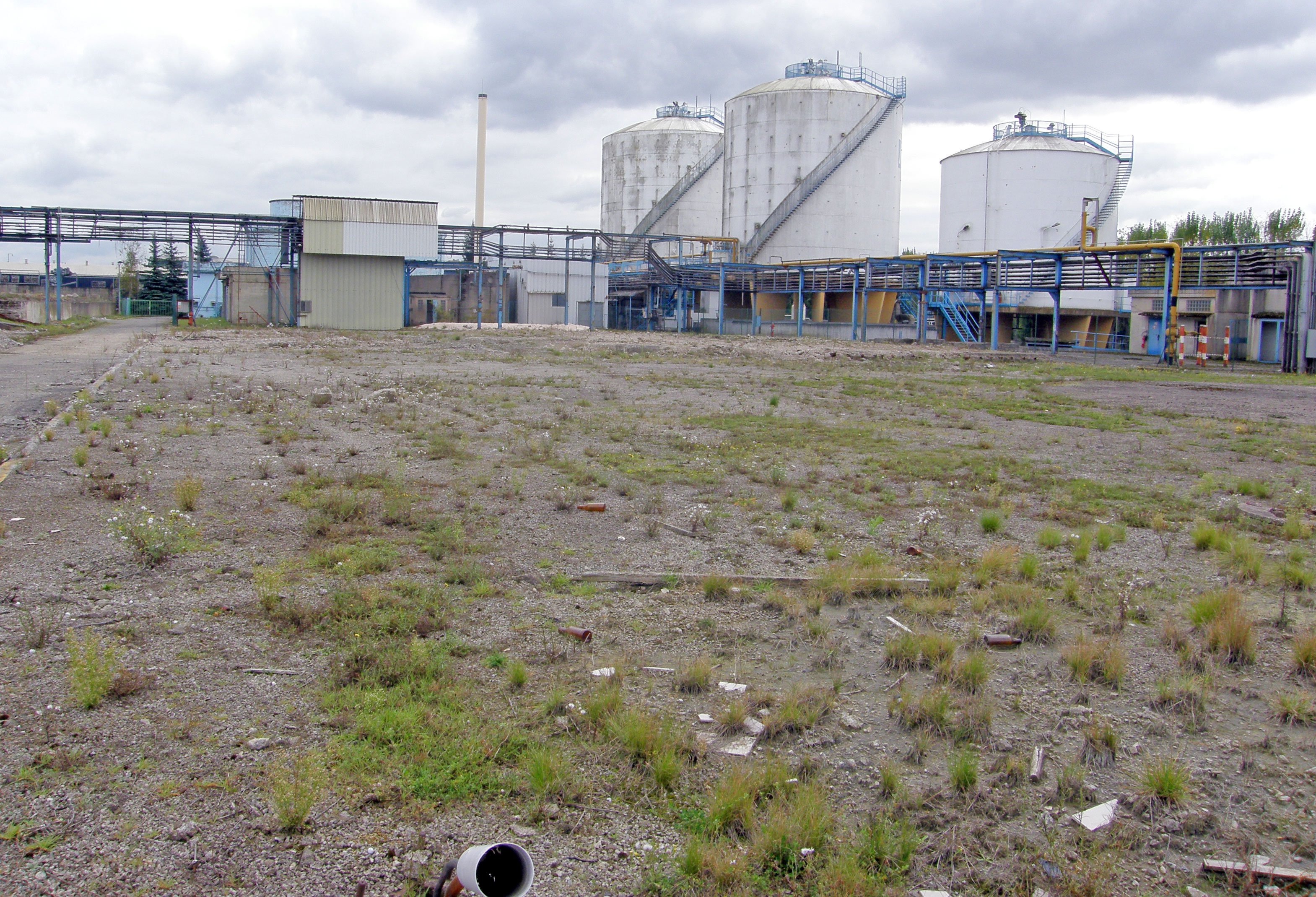 Friche Oxylux.